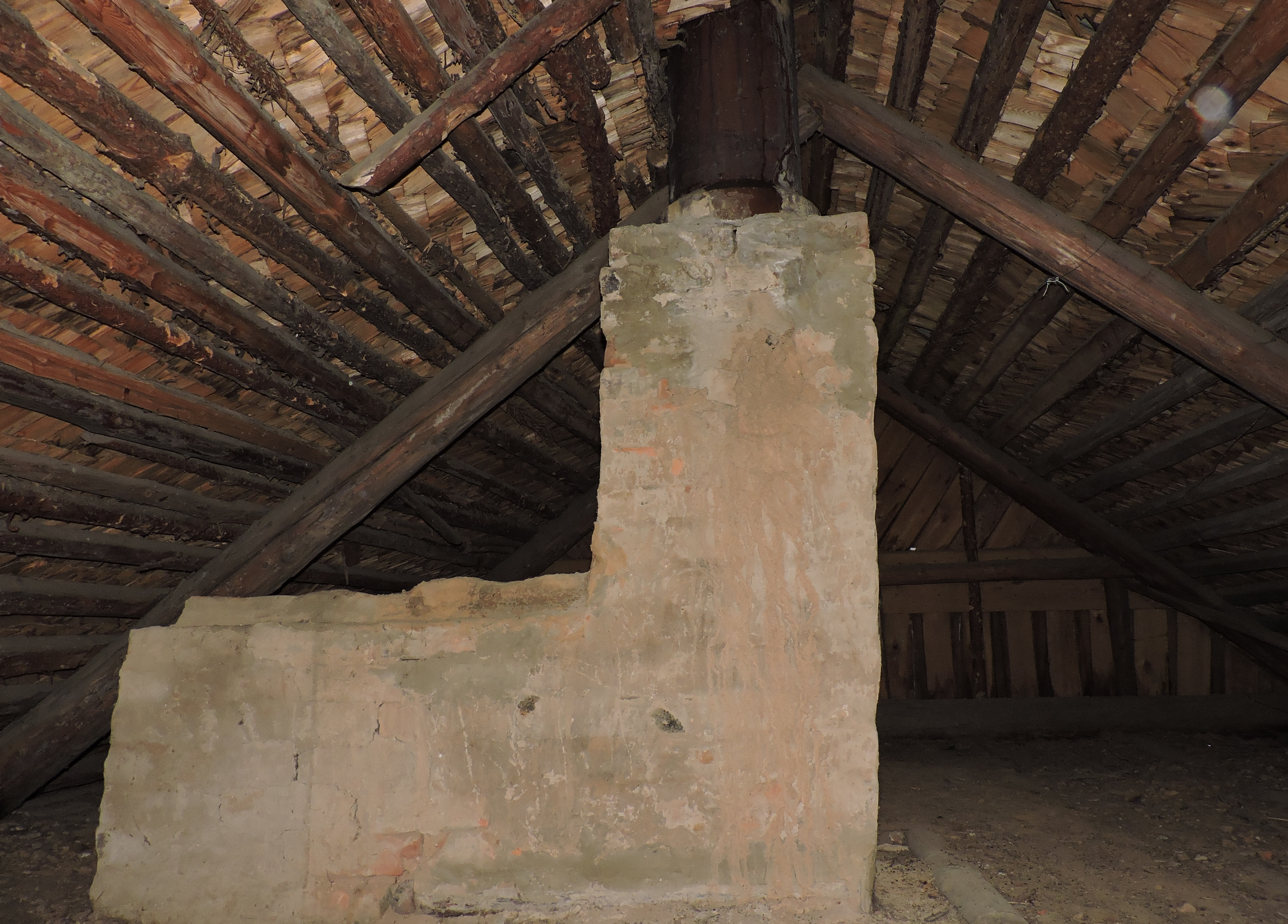 Боров русской печки